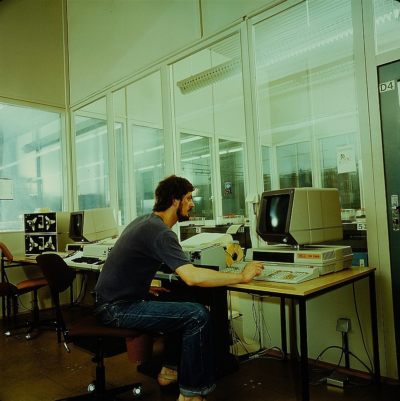 Original image description from the Deutsche FotothekFacharbeiter für Satztechnik